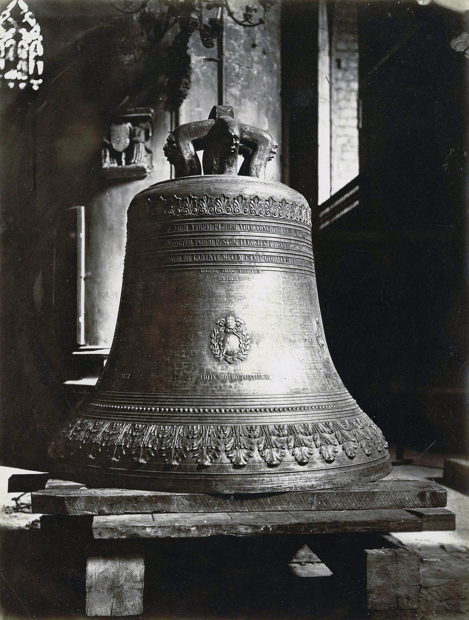 Cathédrale Saint-Étienne, place Saint-Étienne.1876-1878.Vue d'ensemble d'une cloche en fonte déposée sur des planches de bois à l'intérieur d'une église, bourdon Étienne-Florian installé à la cathédrale Saint-Étienne en 1876 ; diamètre de 1,82 mètres, près de 7 mètres de circonférence et poids de 3,950 kilogrammes, battant de 120 kilogrammes ; appelée la Floriane, du nom du cardinal Florian Desprez, archevêque de Toulouse ; fabriquée en 1876 à partir du métal de l'Augustine du couvent des Augustins, fondue au milieu du XVIe siècle.Inscriptions sur la cloche : "LAUDO DEUM VERUM PLEBEM VOCO CONGREGO CLERUM DEFUNCTOS PLORO PESTEM FUGO FESTA DECORO CAPITULUM DECANENTE MEGUM CANIT GLORIAM DEI SANCTE STEPHANE OPN. SANCTE FORORIANE OPN ANNO DOMIXI 1876" ; "PIO IX SUMMO PONTIFICI. FLORIANO DESPREZ ARCHIEPISCOPO CAPITULI SGIILLUM" ; "Levèque Amans, fondeur à Toulouse".Timbre sec en bas : "E. Delon. Photographe. Rue Lafayette 18. Toulouse".Tirage collé sur carton, format du cliché : 28 x 21 cm. Coin supérieur droit du carton manquant.Cette cloche est mentionnée dans Musica Sacra, revue du chant liturgique et de la musique religieuse, Aloys Kunc, directeur, n° 11, édition du 6 octobre 1876 et Jules de Lahondès, Toulouse chrétienne : l'église Saint-Etienne cathédrale de Toulouse, Toulouse, Edouard Privat, libraire-éditeur, 1890, p. 221-222.Voir aussi 26Fi51. Modalités d'entrée : Achat à M. Sébastien Lemagnen le 29/10/2010.